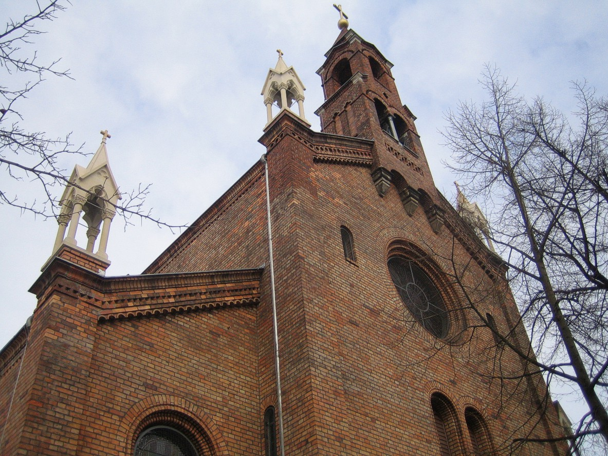 Die Kirche St. Marien am Behnitz in Berlin-Spandau. Fassade, Teilansicht